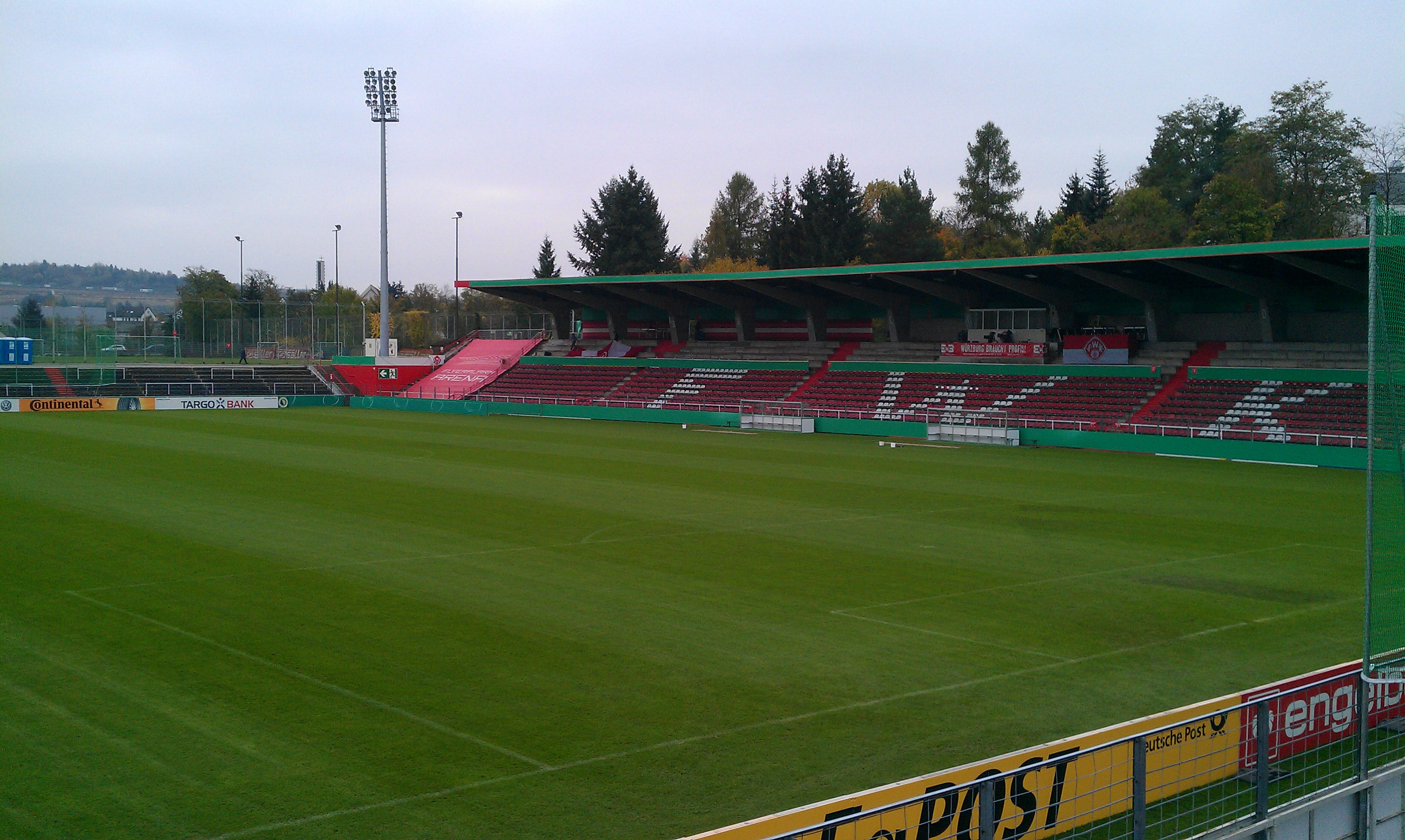 Flyeralarm-Arena der Würzburger Kickers vor dem DFB-Pokalspiel gegen Eintracht Braunschweig mit Blick auf die Haupttribüne